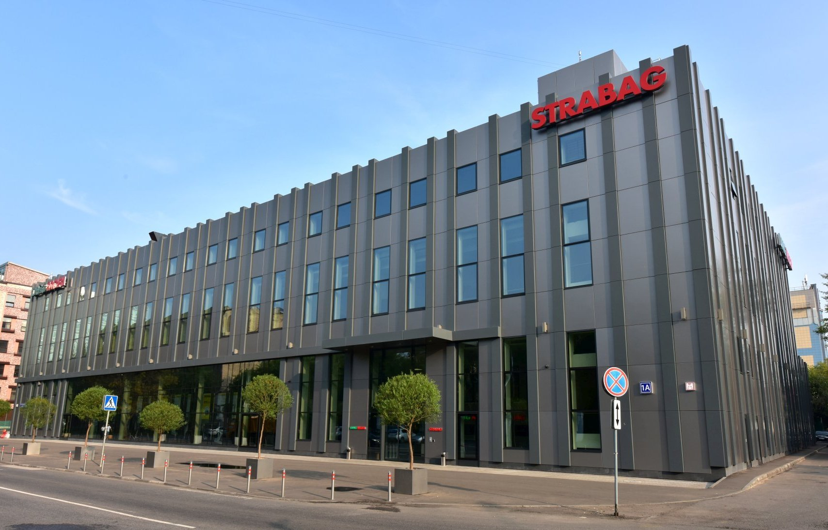 Главный офис STRABAG в регионе Россия и соседние государства. 125130, Москва, Старопетровский проезд 1А. Строение 1992 года, реконструировано в 2000-е.